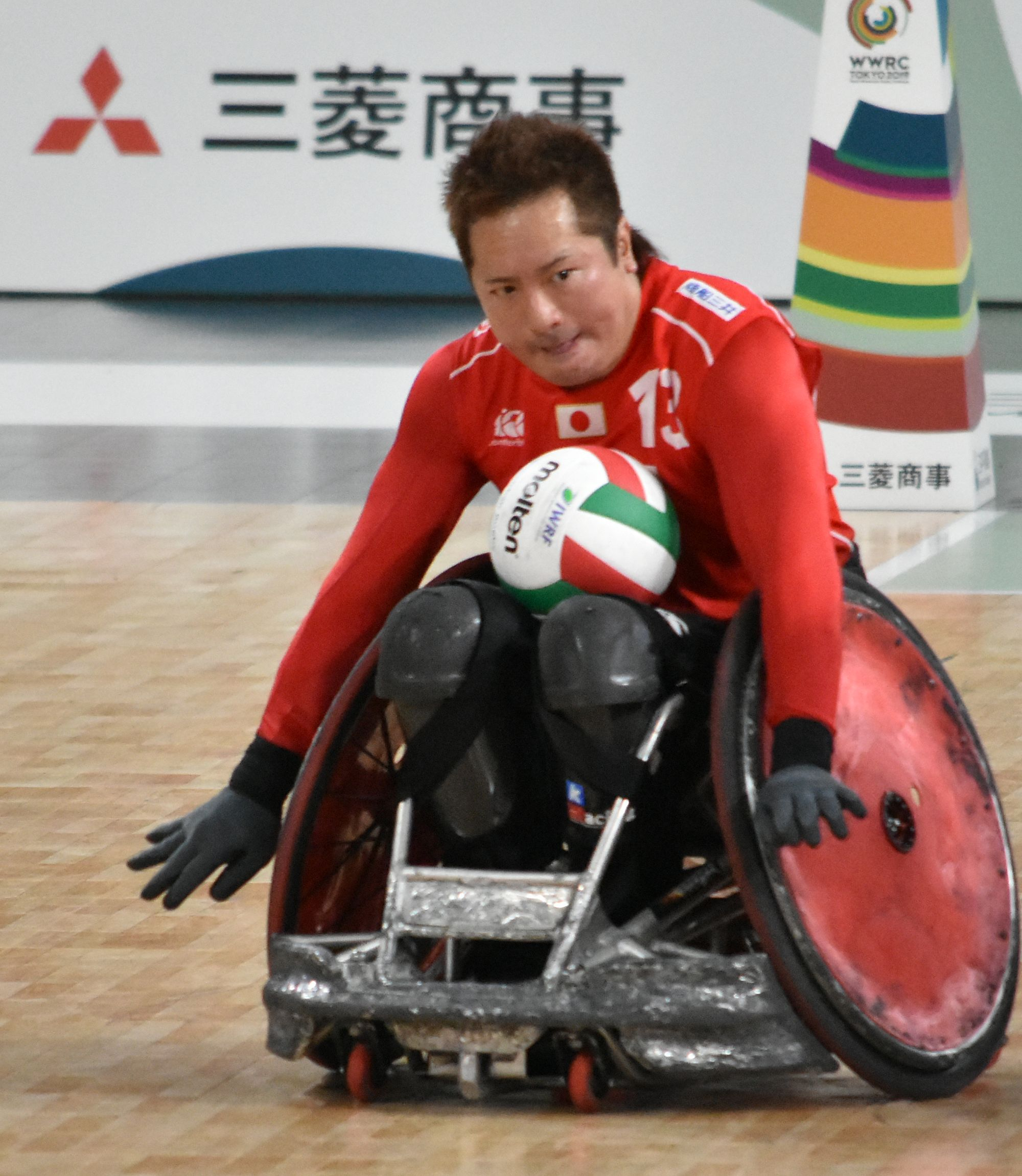 車いすラグビーワールドチャレンジ2019 島川 慎一